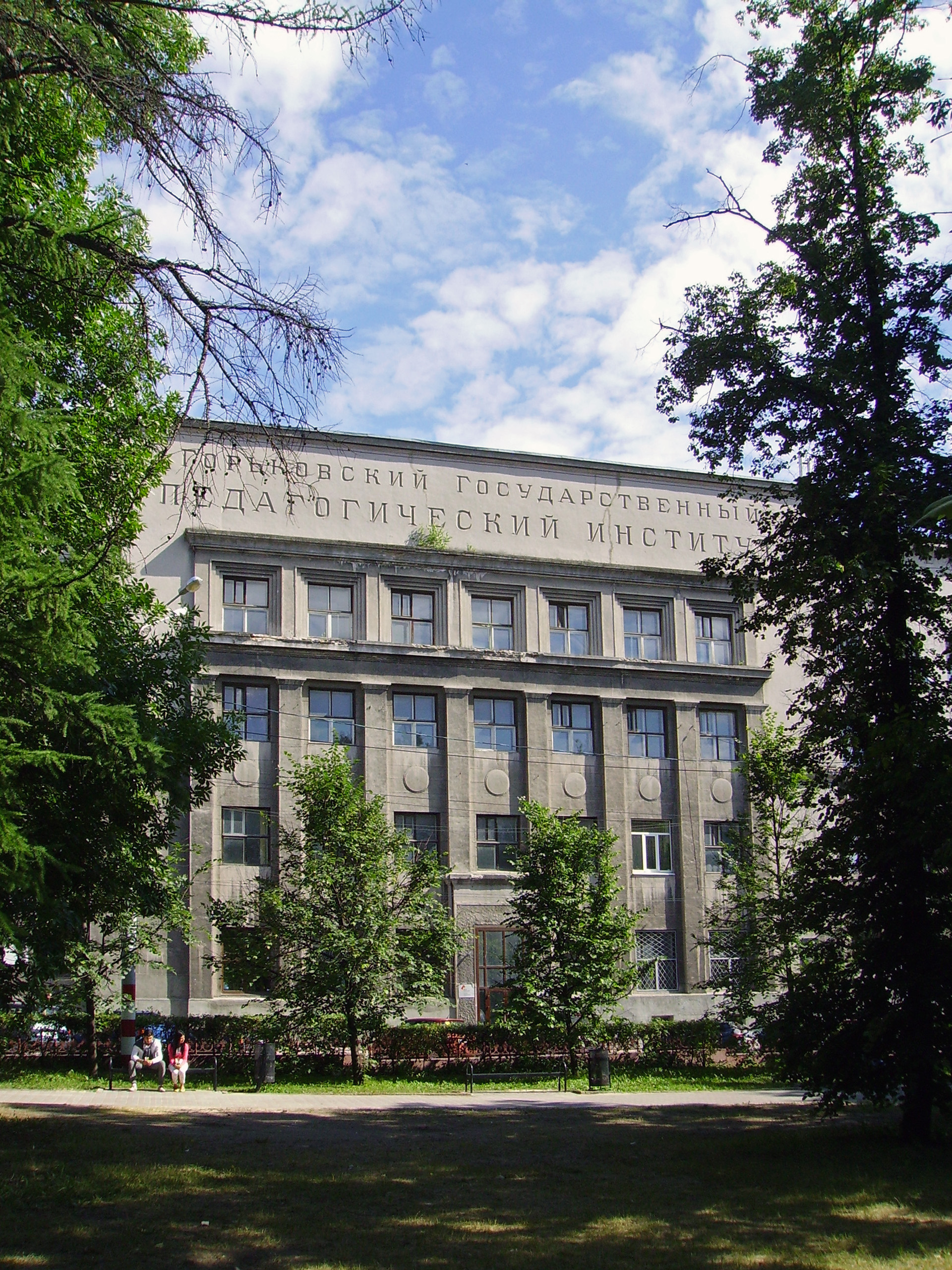 Нижний Новгород. Фасад Мининского университета.